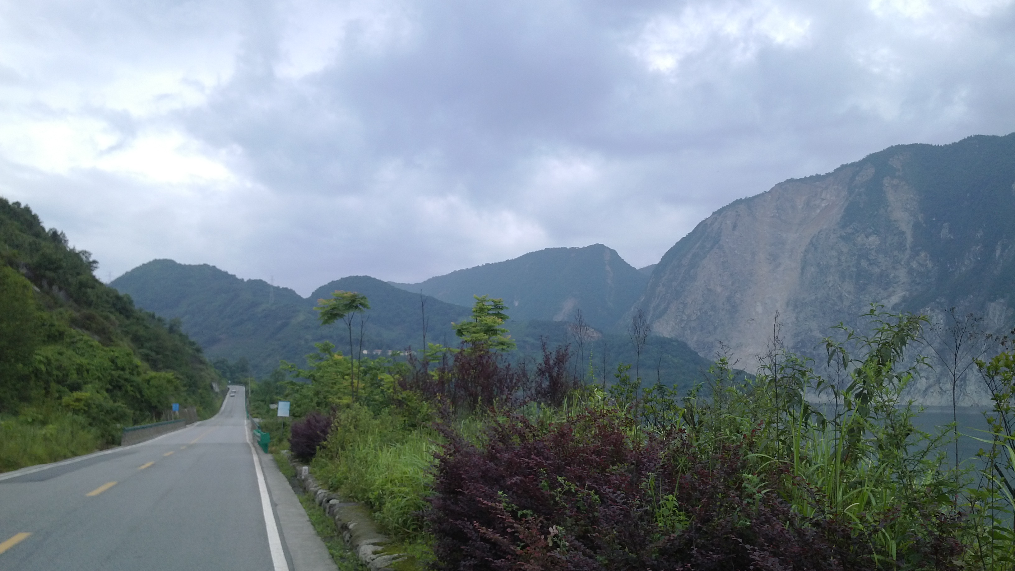 紫平铺水库中部